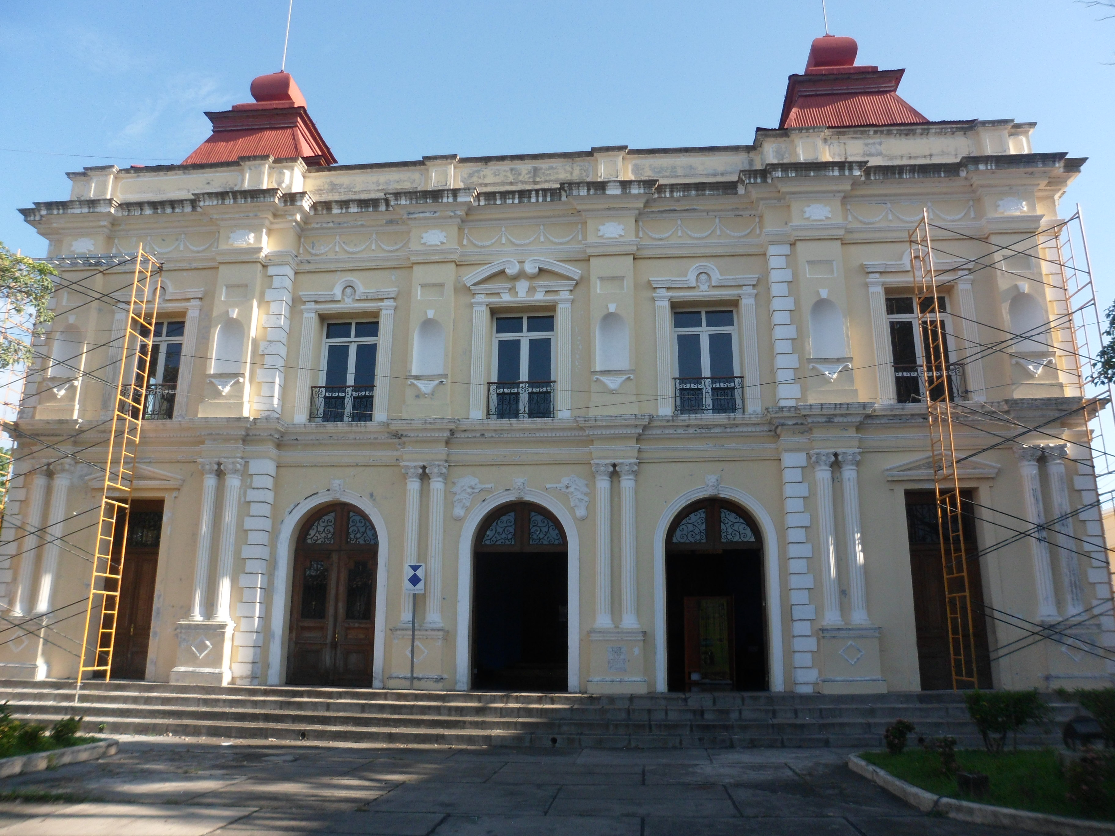 Teatro de la ciudad de san miguel, El Salvador